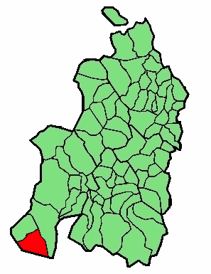 Urepele udalerriaren kokapena Nafarroa Beherean